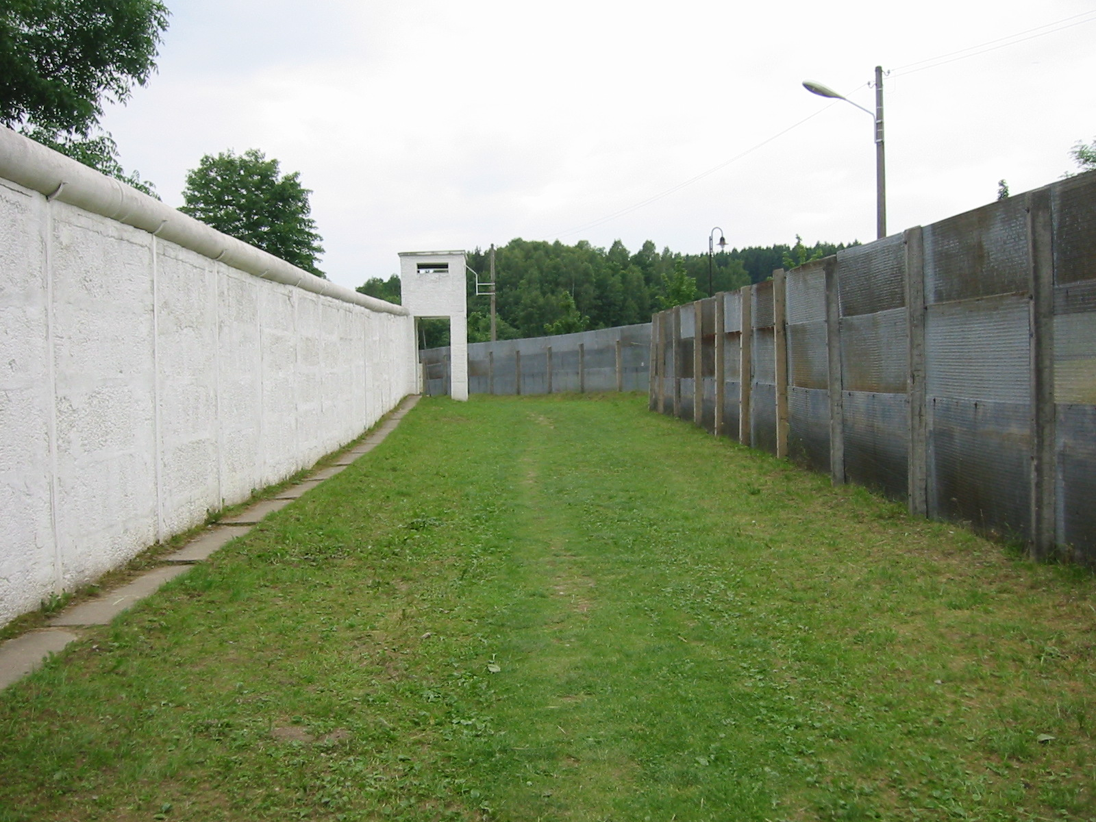 Mödlareuth, Freilichtmuseum